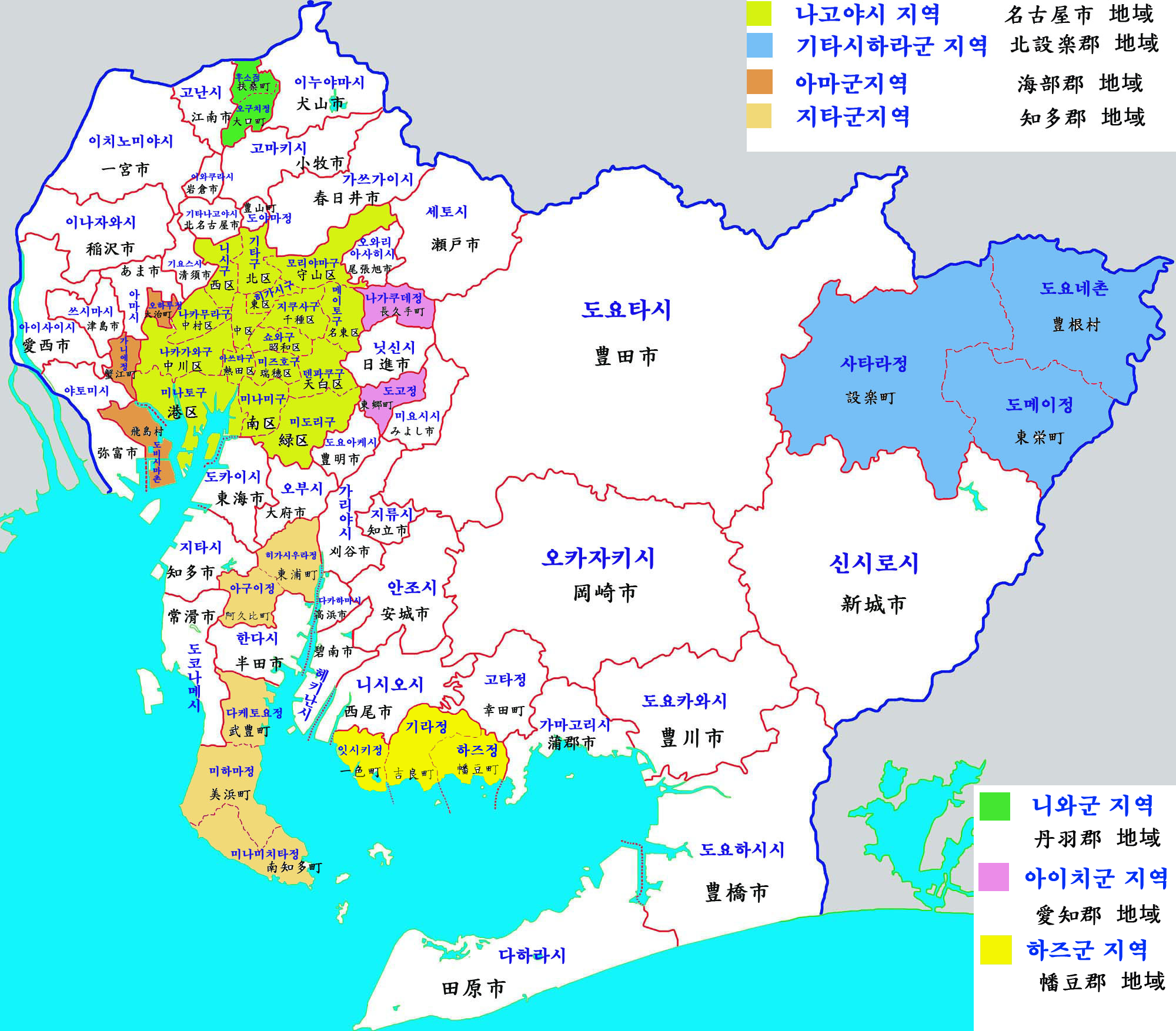 아이치현 행정구역